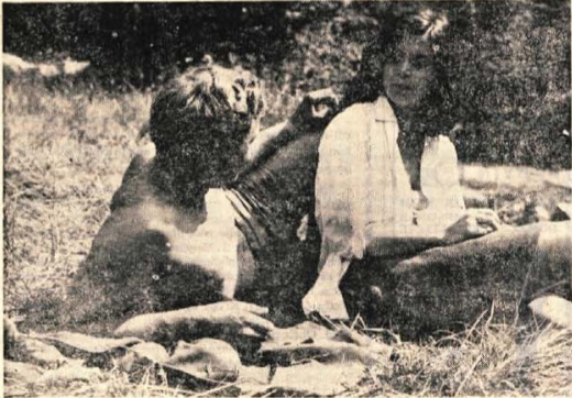 Prizor iz Pete zasede. Dare Valič kot načelnik štaba in Marjana Brecelj kot partizanska Mija.